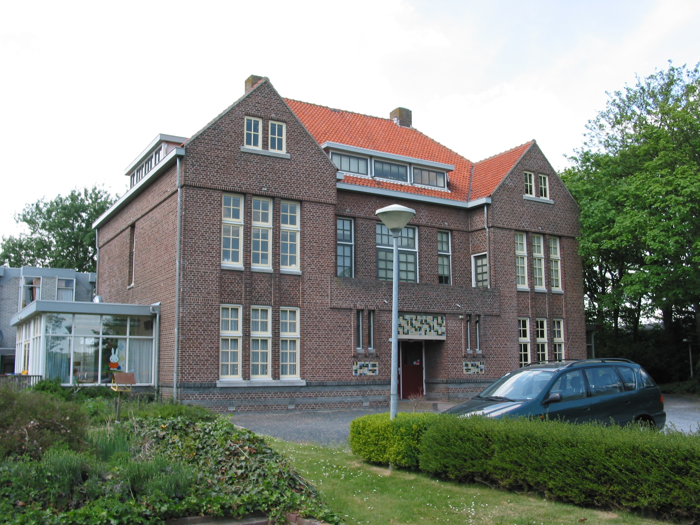 De Vonk vacation hostel, Noordwijkerhout, entrance (architect J.J.P. Oud, decorator Theo van Doesburg). 1917-1918.